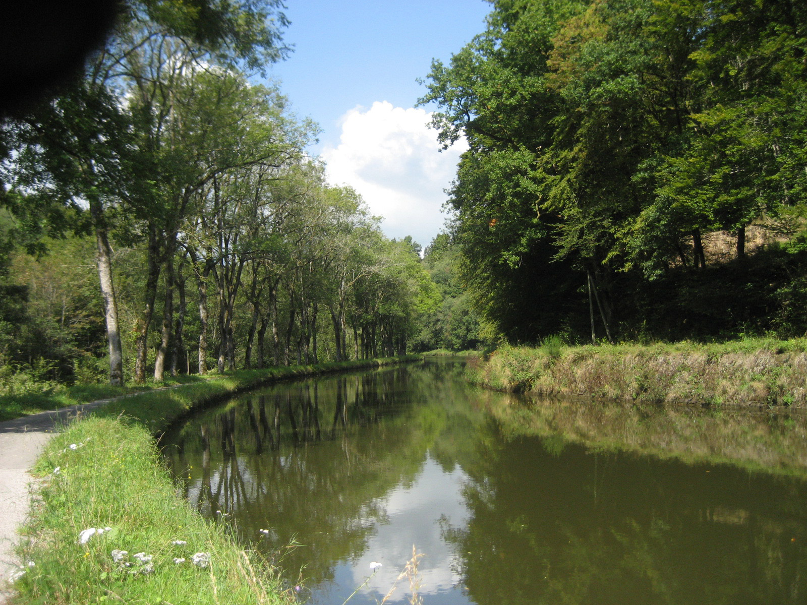 Canal des Vosges near Hautmougey, département des Vosges, France